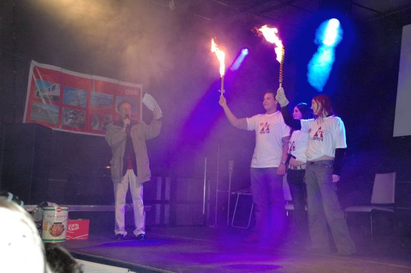 Nacht der Physik 2005 Lichterkette Einstein